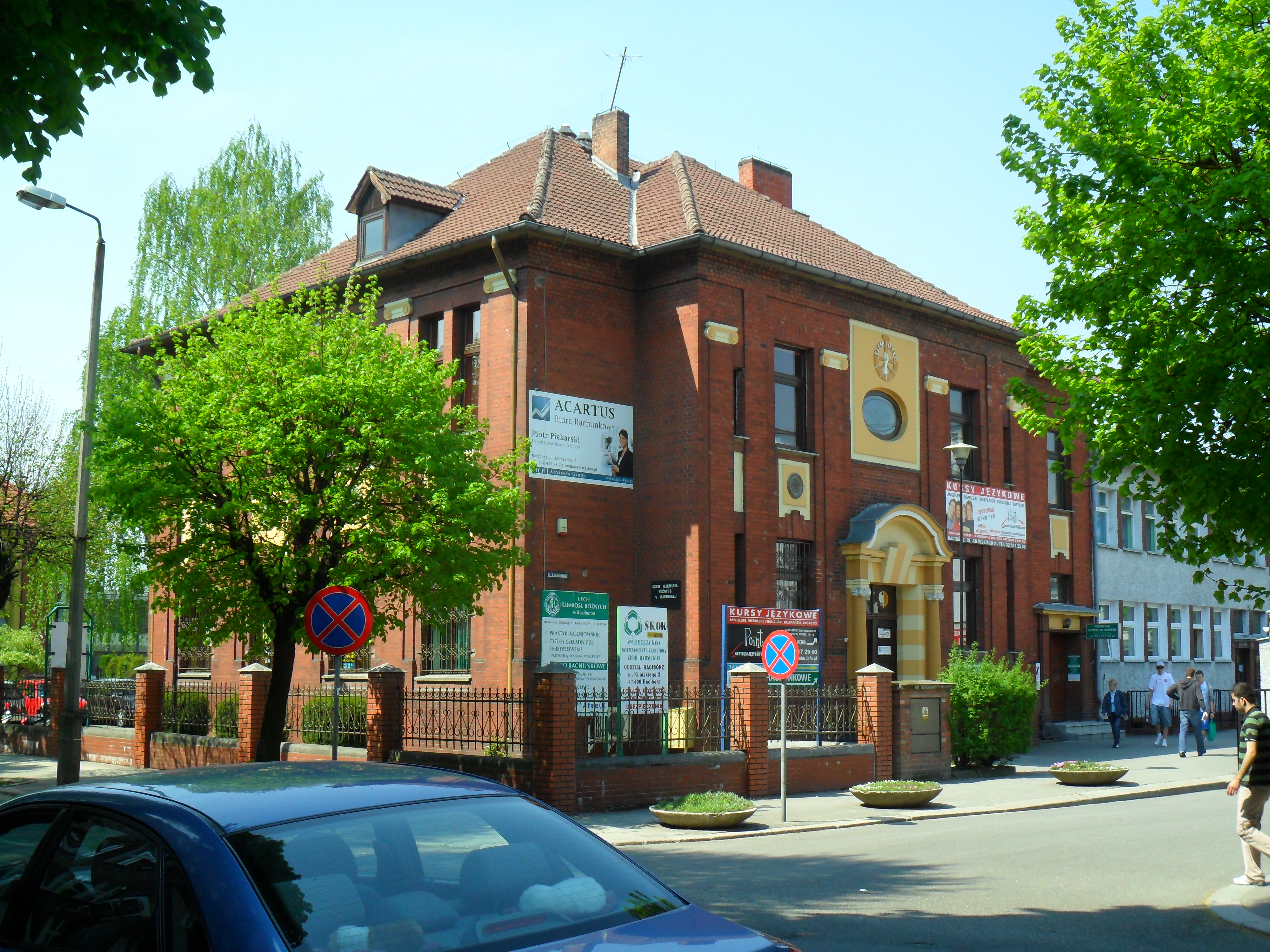 Racibórz, ul. Jana Kilińskiego 2 - dawny dom parafii ewangelickiej, obecnie siedziba Cechu Rzemiosł Różnych